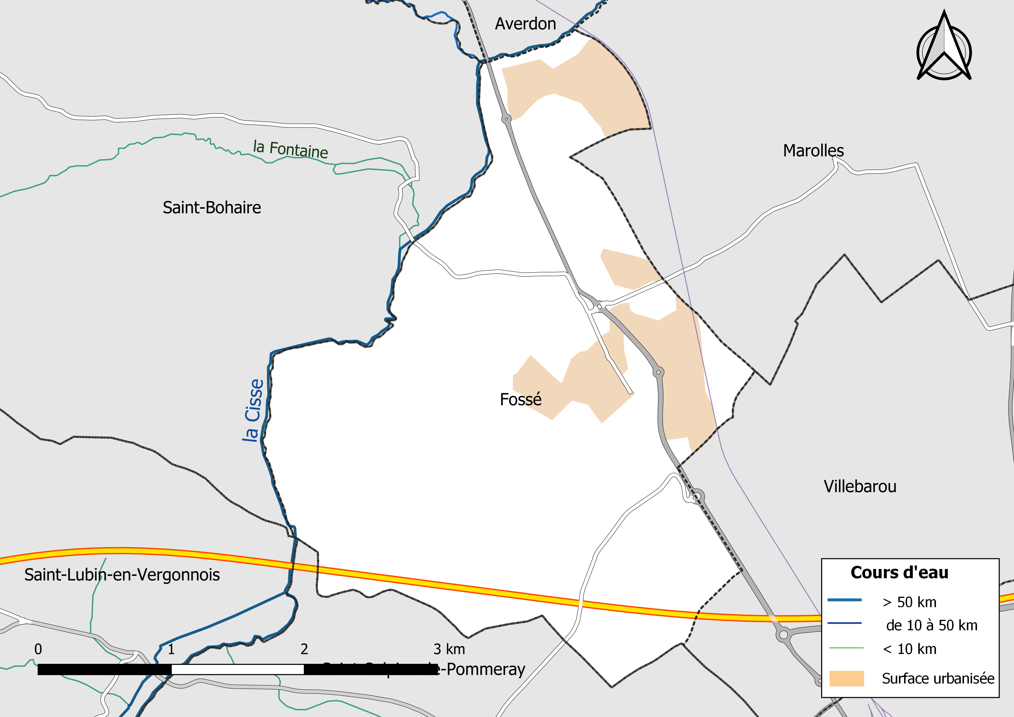 Carte du réseau hydrographique de la commune de Fossé (Loir-et-Cher) (France).